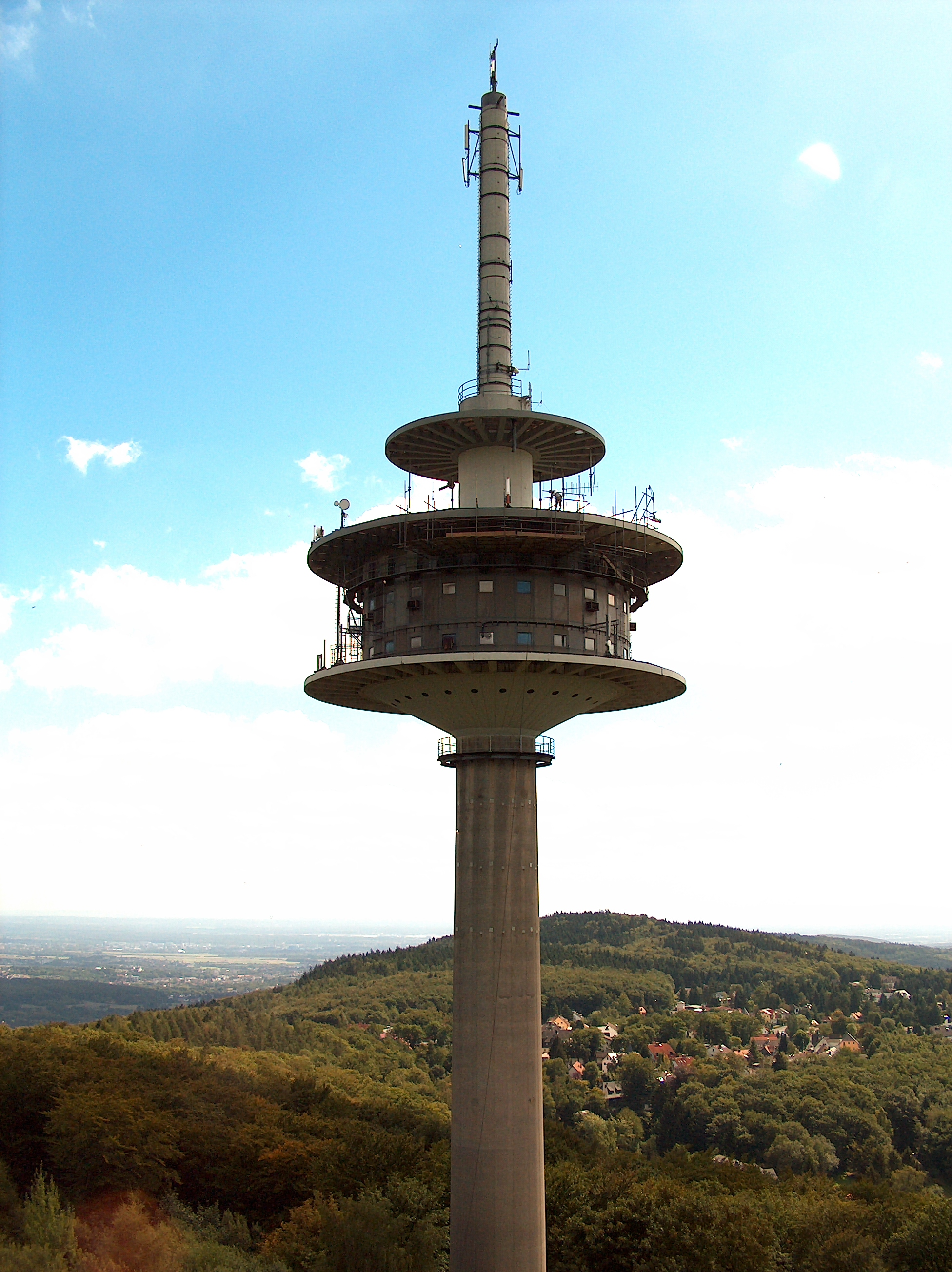 Tower at Kelkheim, Germany